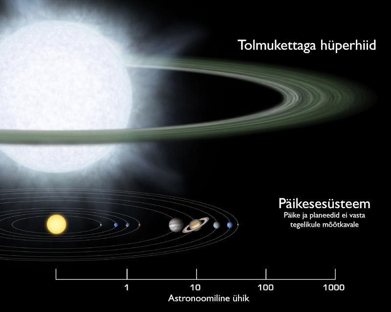 Ioniseeritud protoplanetaarse kettaga hüperhiidude HD 268835 (R 66) ja HD 37974 (R 126) suurus võrreldes Päikesesüsteemiga